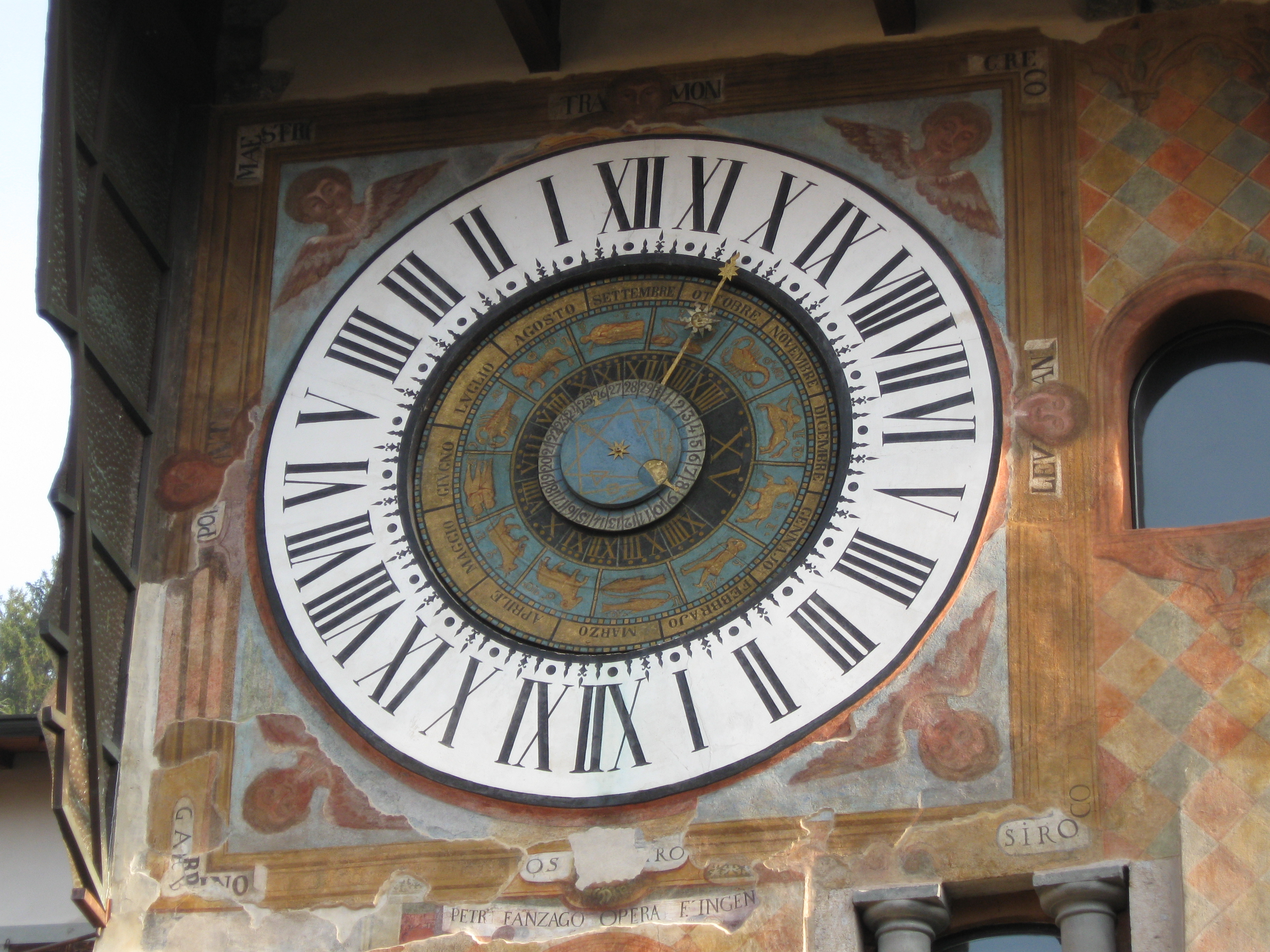 L'orologio astronomico di Clusone, Val Seriana, Italy.